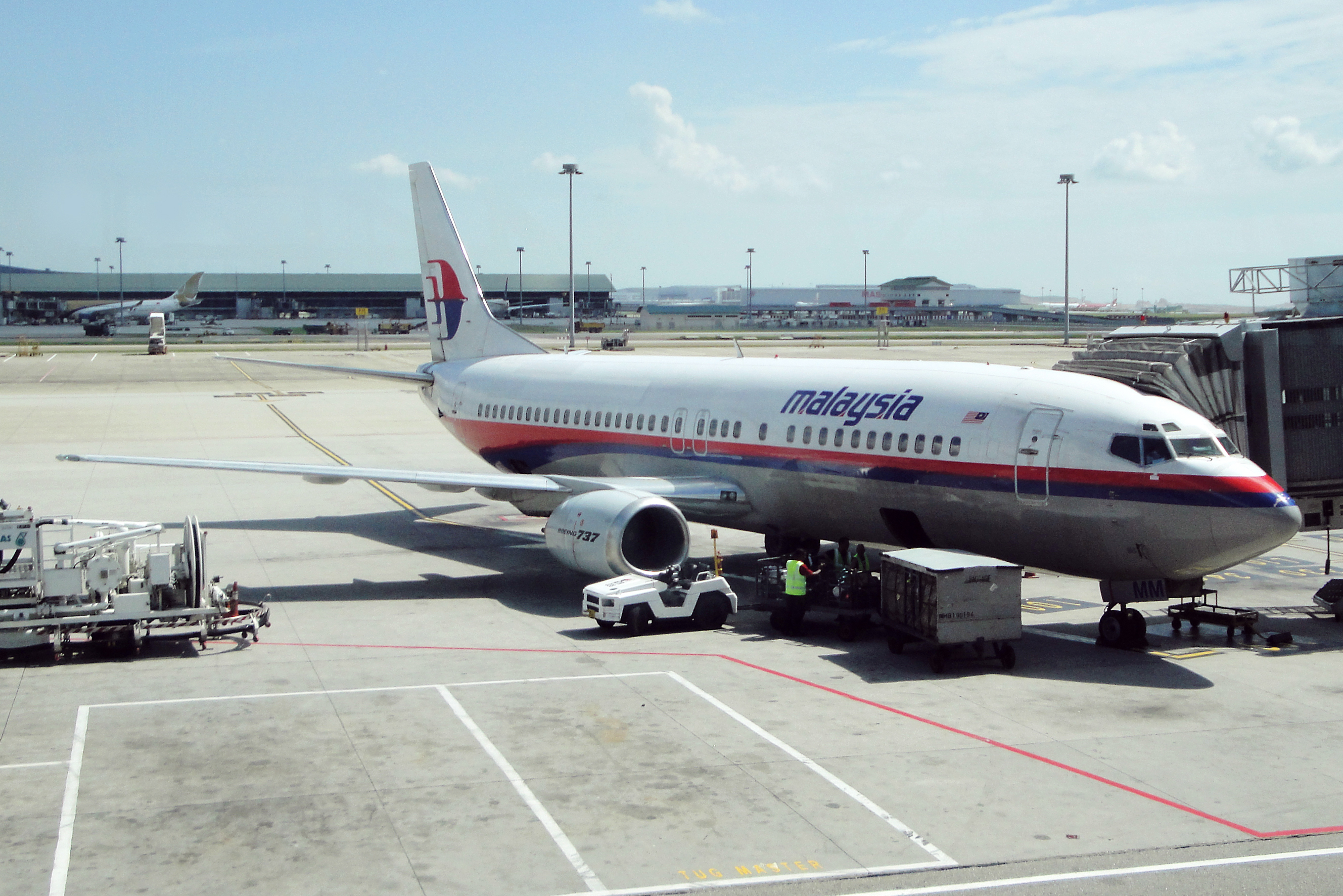 Kuala Lumpur - International (Sepang) (KUL / WMKK) Malaysia 12.2010